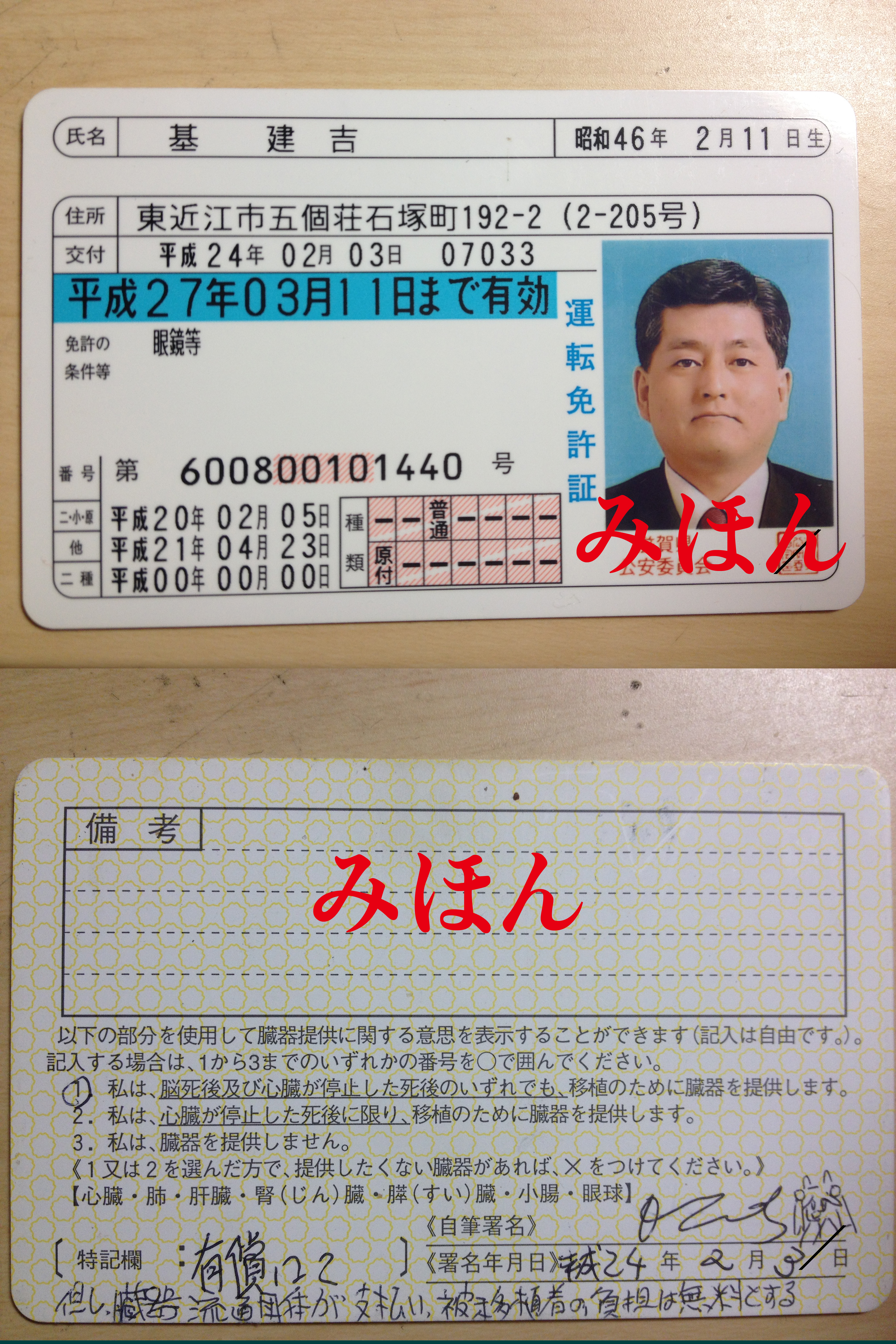 自動車運転免許証２０１２年版・見本。投稿者本人。